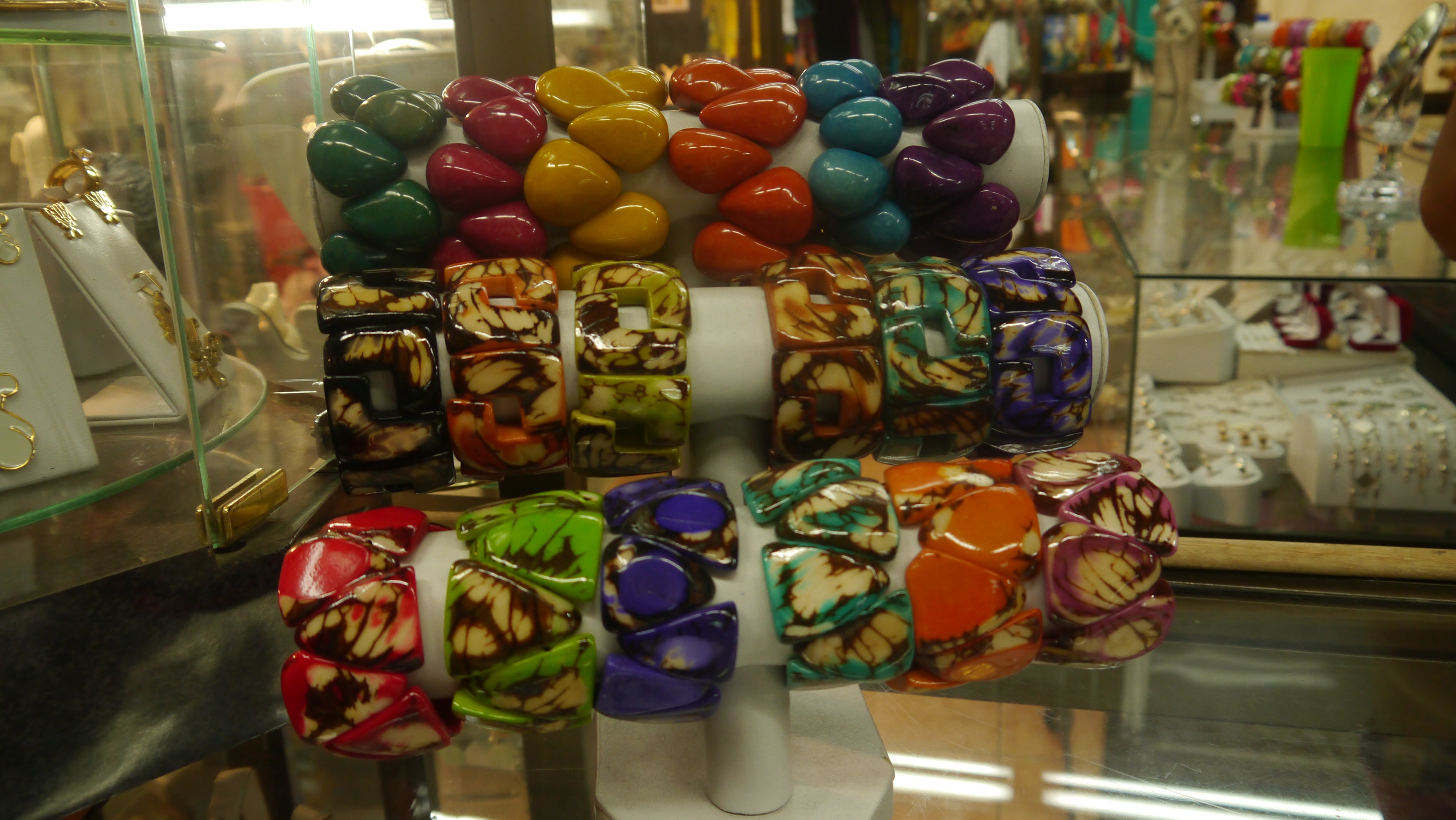 Pulseras de tagua artesanales